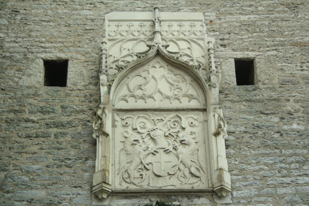 Suure Rannavärava vapikilp Tallinnas